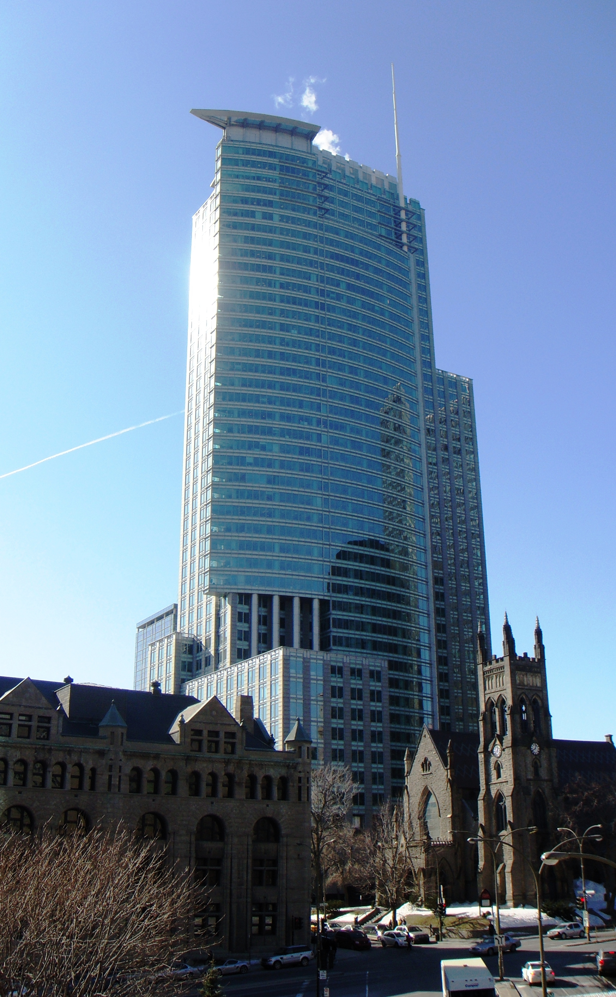 1250 René-Lévesque, Montréal